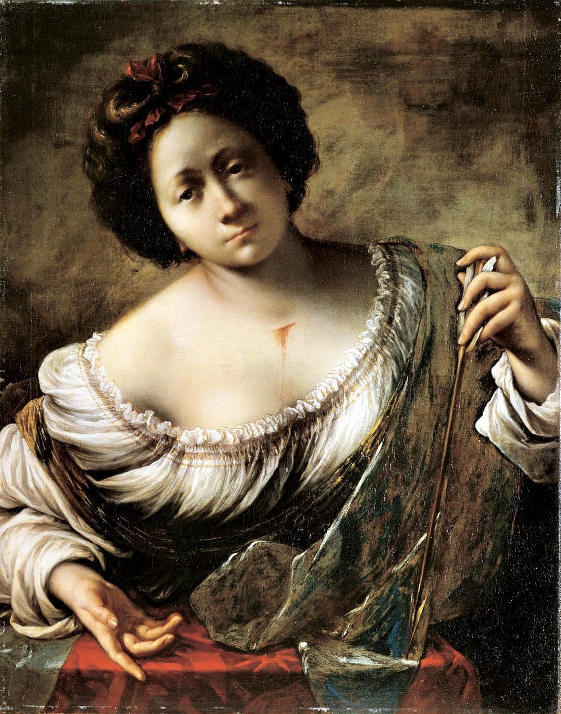 Saint Christina of Bolsenalabel QS:Lit,"Santa Cristina" label QS:Len,"Saint Christina of Bolsena" label QS:Les,"Santa Cristina"